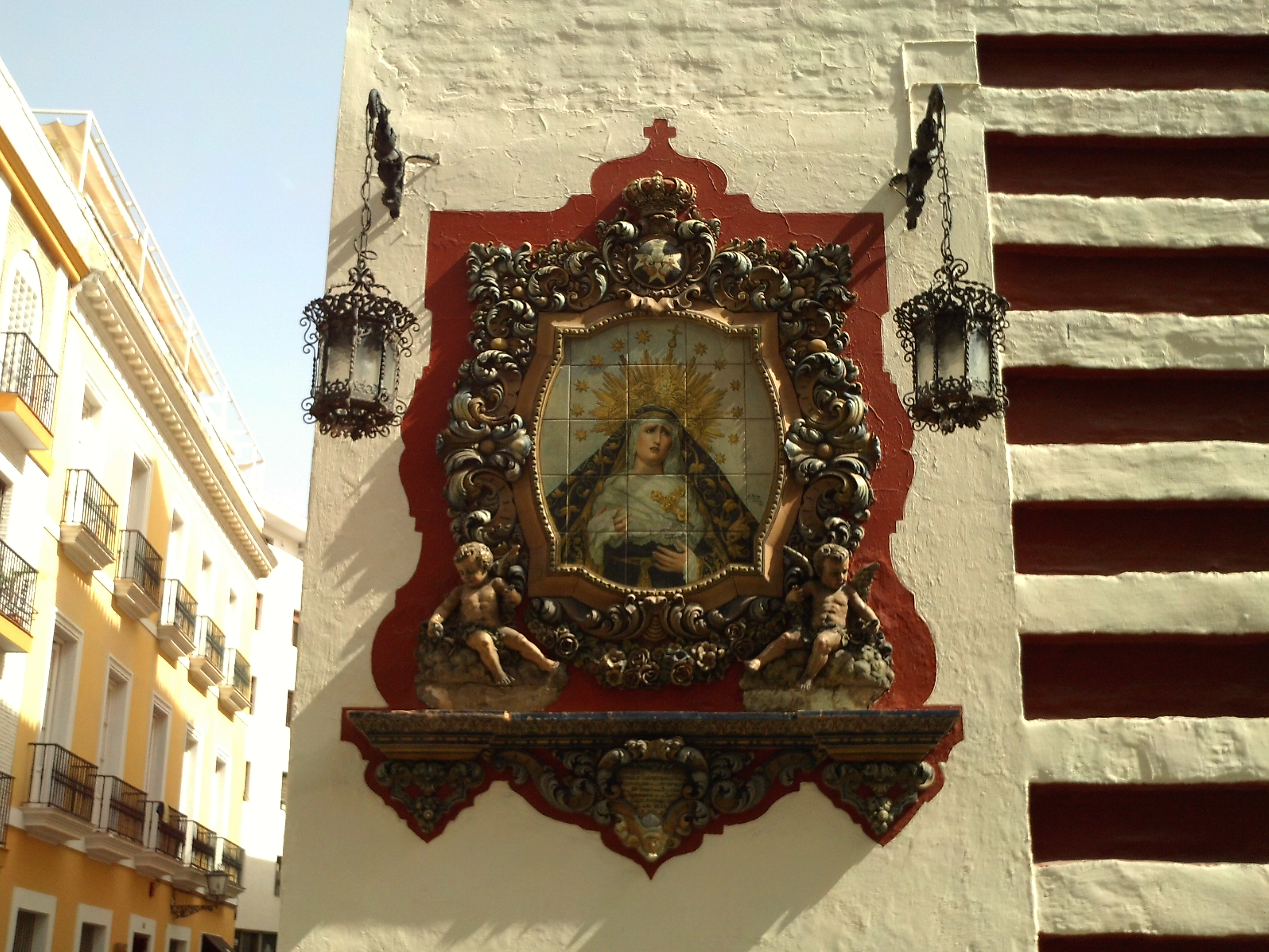 Retablo cerámico de la Virgen de la Soledad. 1951. Iglesia de San Buenaventura. Sevilla, Andalucía, España.